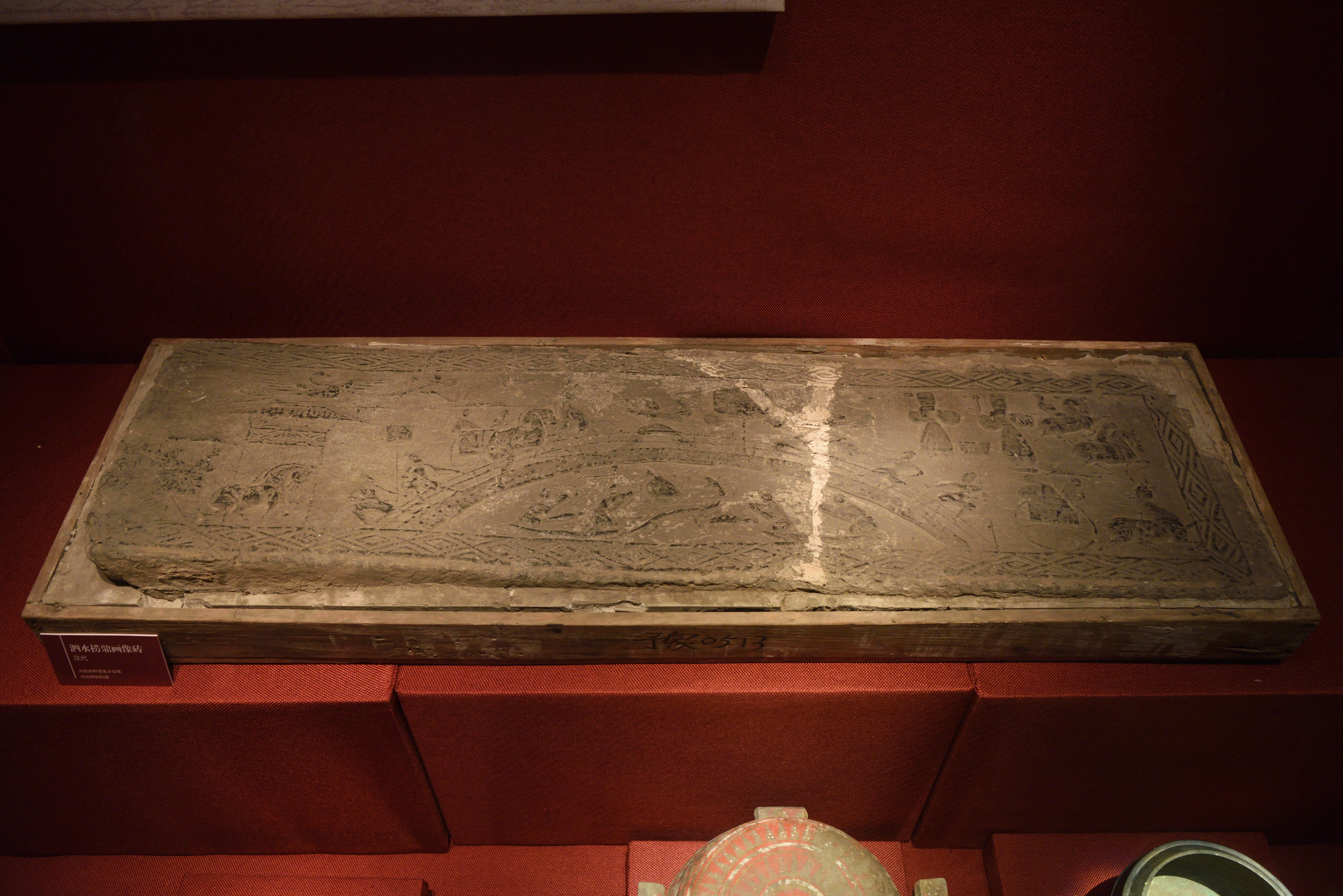 汉代泗水捞鼎画像砖，2016年杭州良渚博物院“鼎盛中华”特展展出